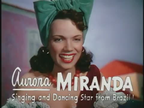 Imatges del tràiler de la pel·lícula "Los Tres Caballeros". Els tràilers de les pel·lícules publicats abans de 1964 als Estats Units es troben en domini públic